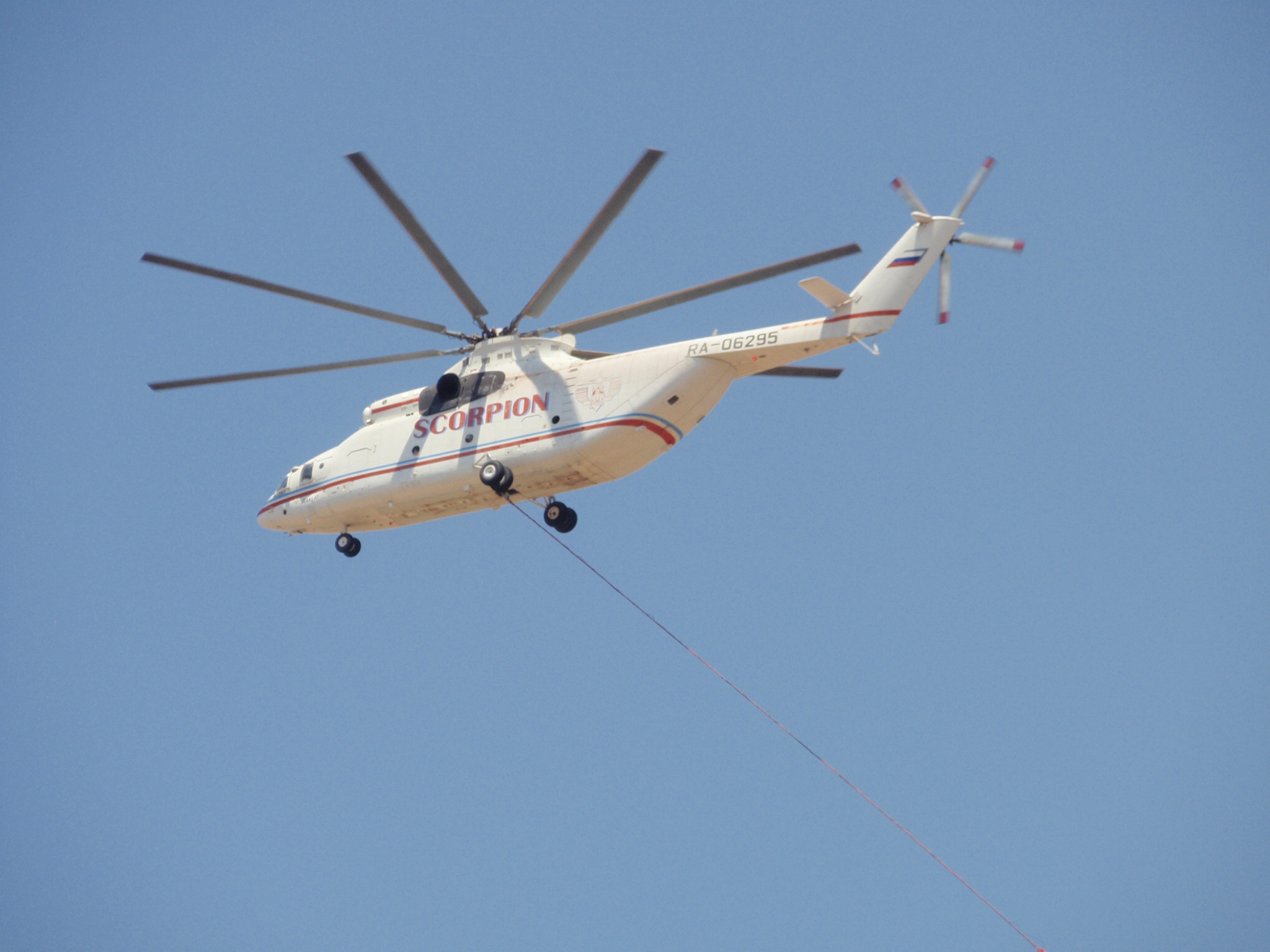 クレタ島にて。山火事の消火作業にあたっていました